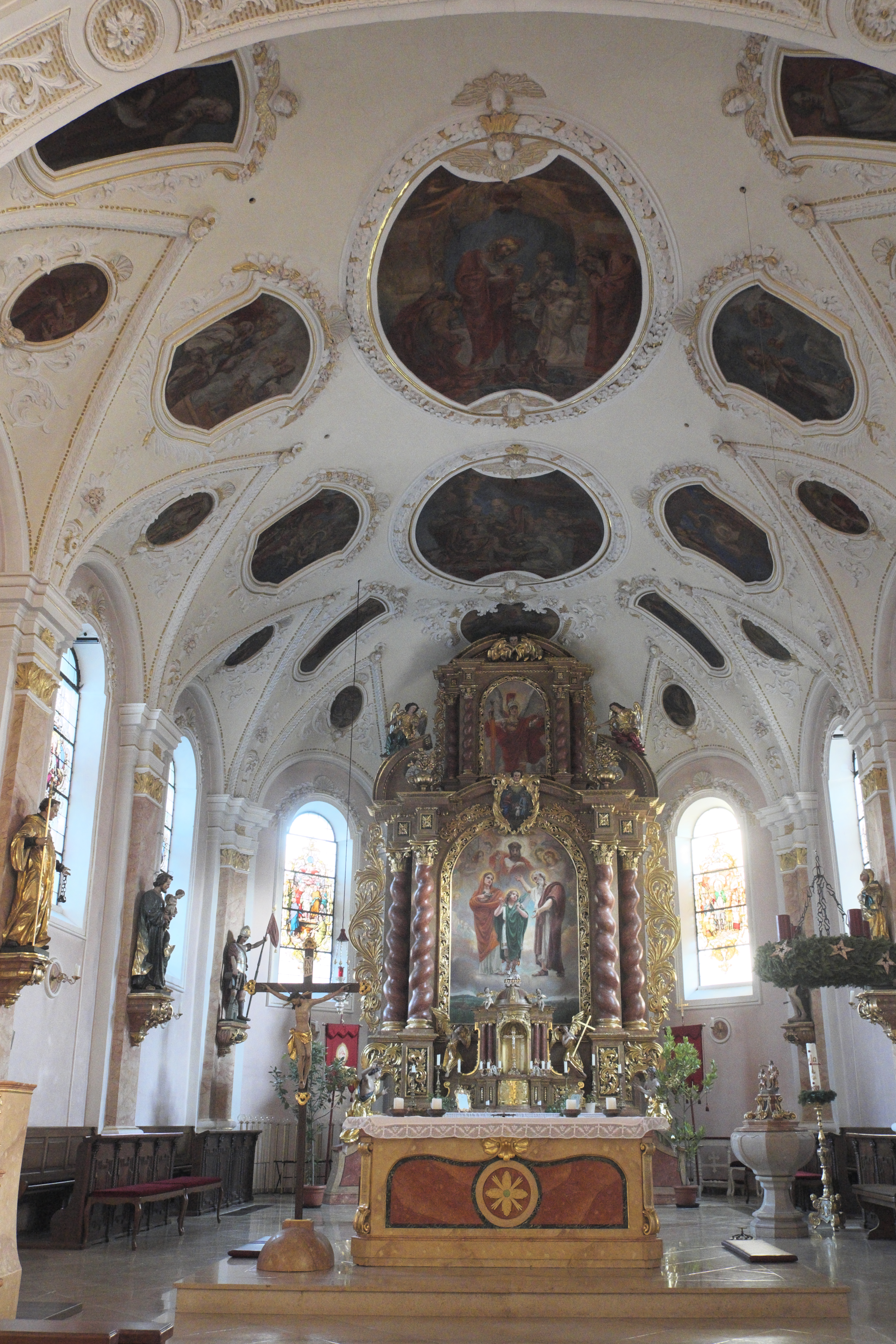 Katholische Pfarrkirche St. Vitus in Au in der Hallertau im Landkreis Freising (Bayern/Deutschland), Chor